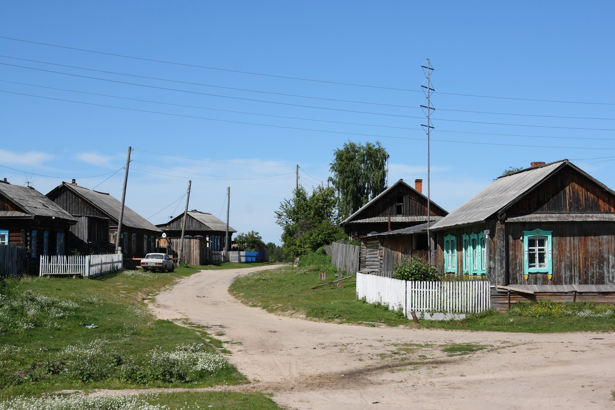 Куяново